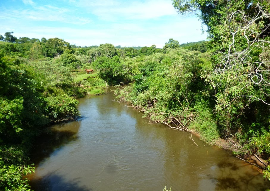 Rio das Almas na divisa entre os municípios de Ribeirão Grande e Capão Bonito, estado de São Paulo.